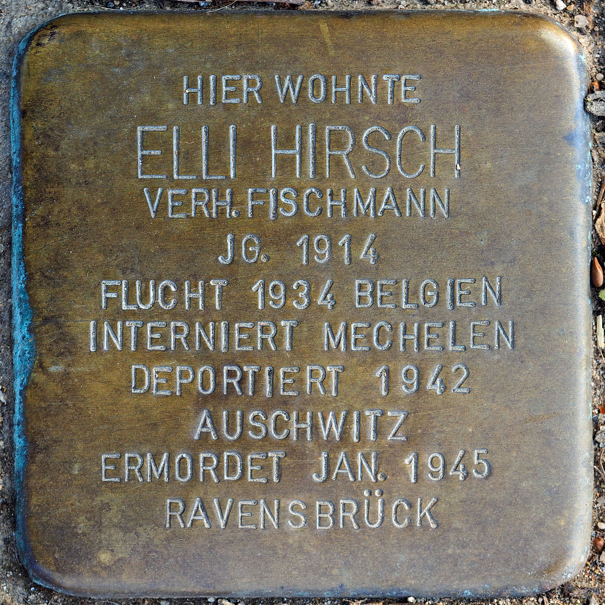 Stolpersteine GV: Hirsch, Elli